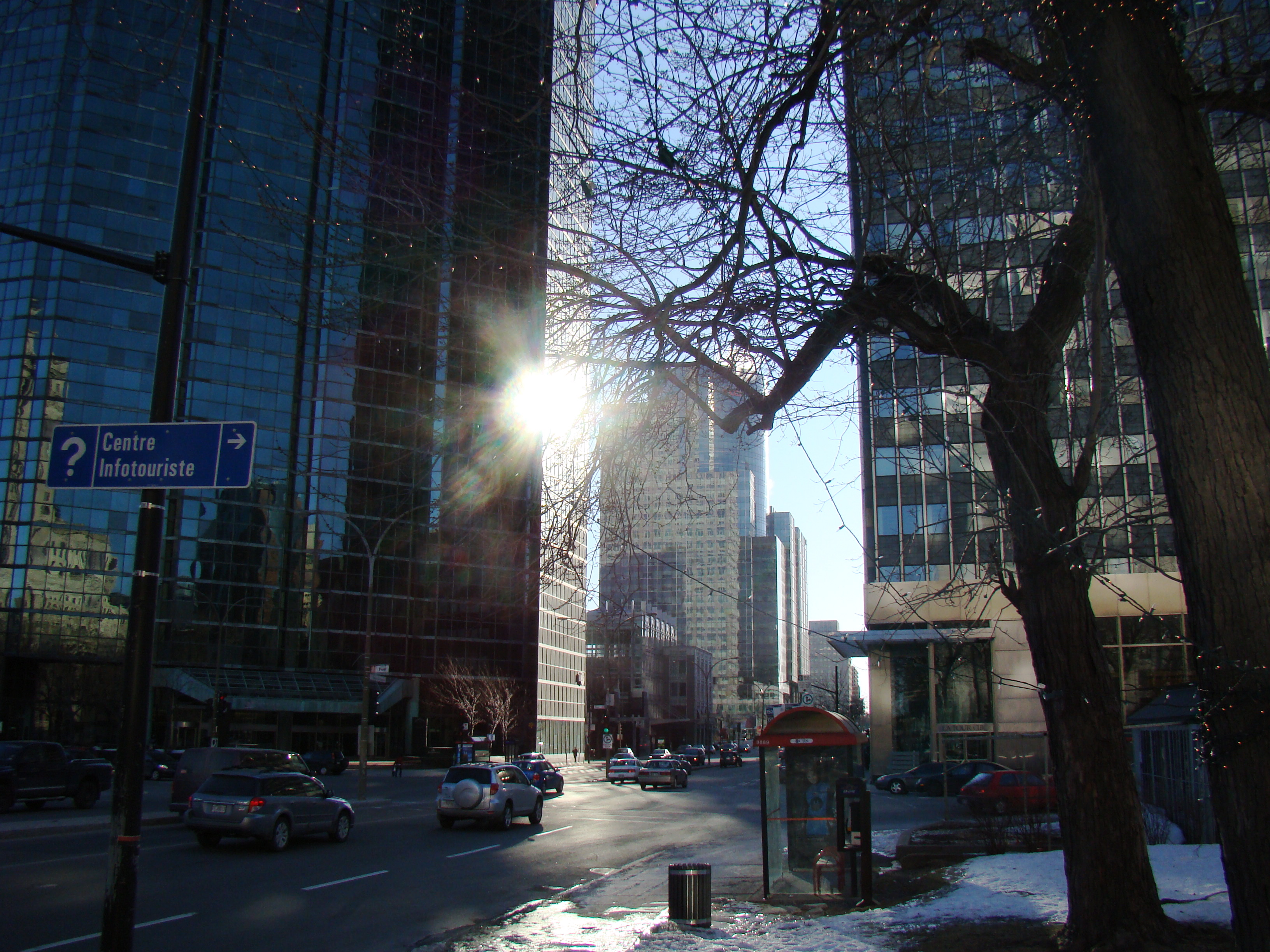 Peel at Rene-Levesque \n